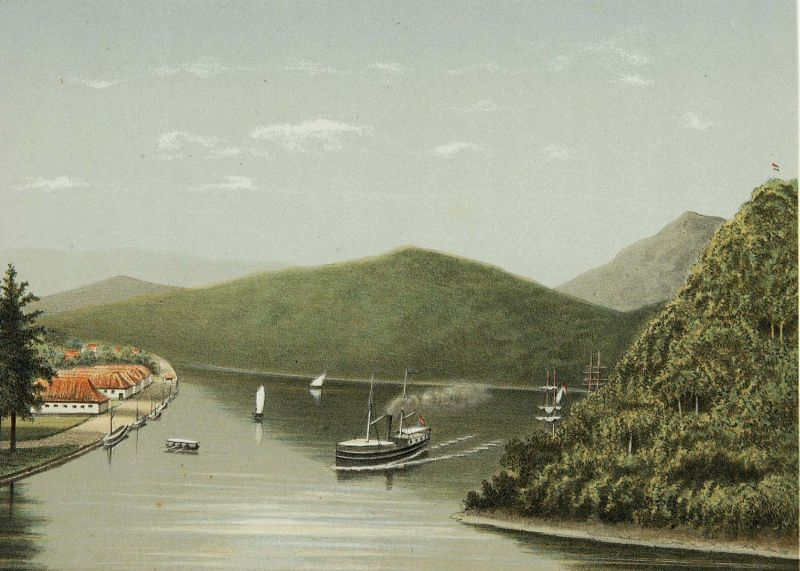 Litho. Litho naar een oorspronkelijke aquarel van J. Rappard.. De rivier van Padang